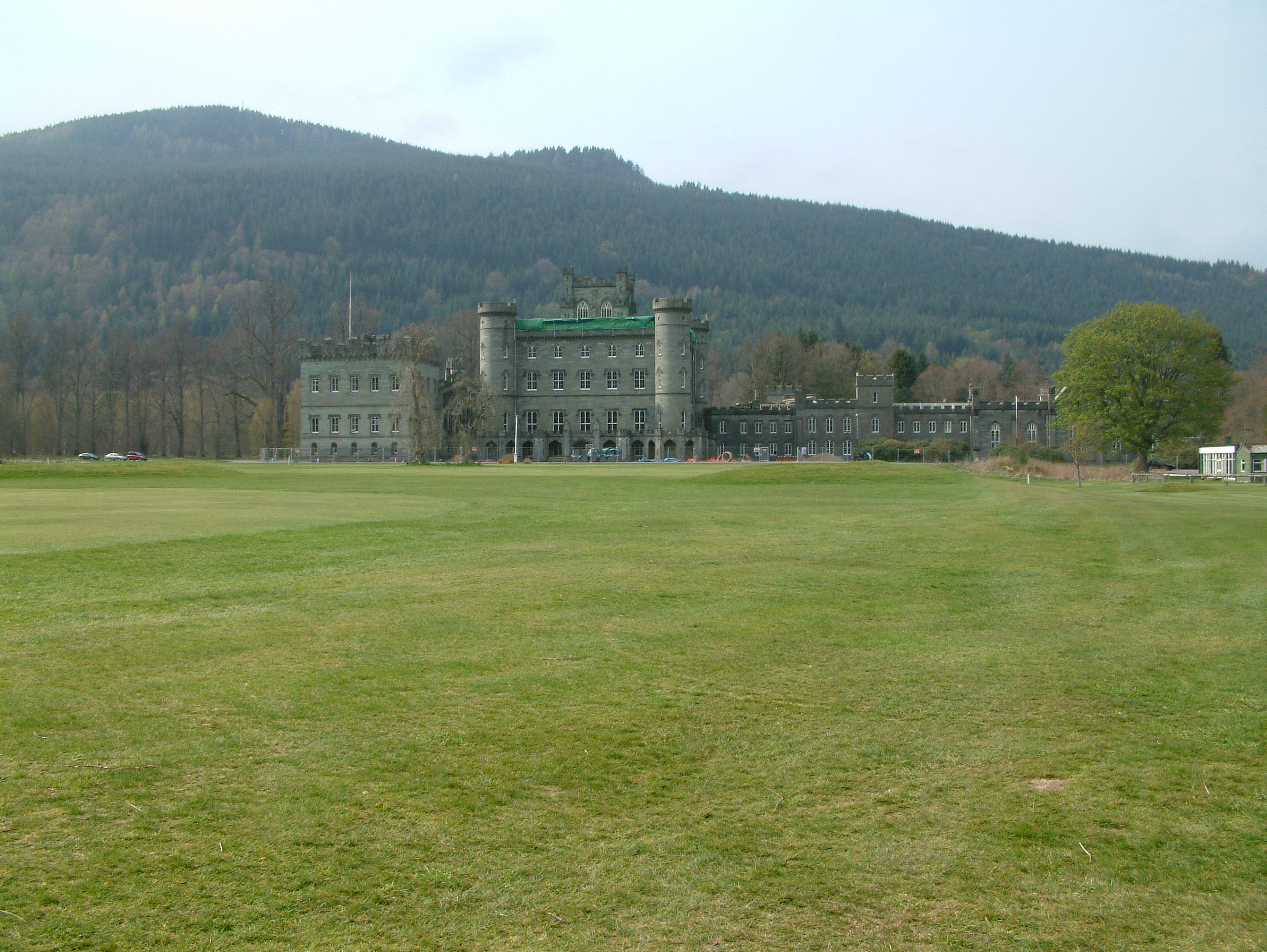 Taymouth castle.